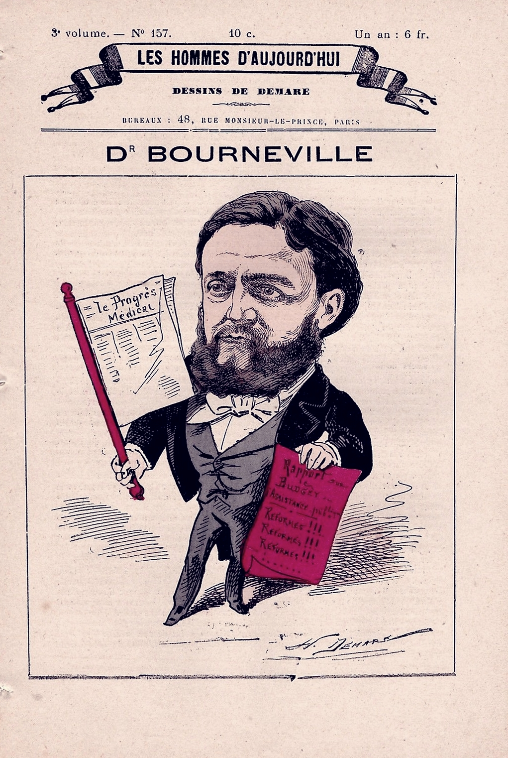 Docteur Désiré-Magloire Bourneville (1840-1909), caricature par Henri Demare, Les Hommes d'aujourd'hui, n°157, 1882.